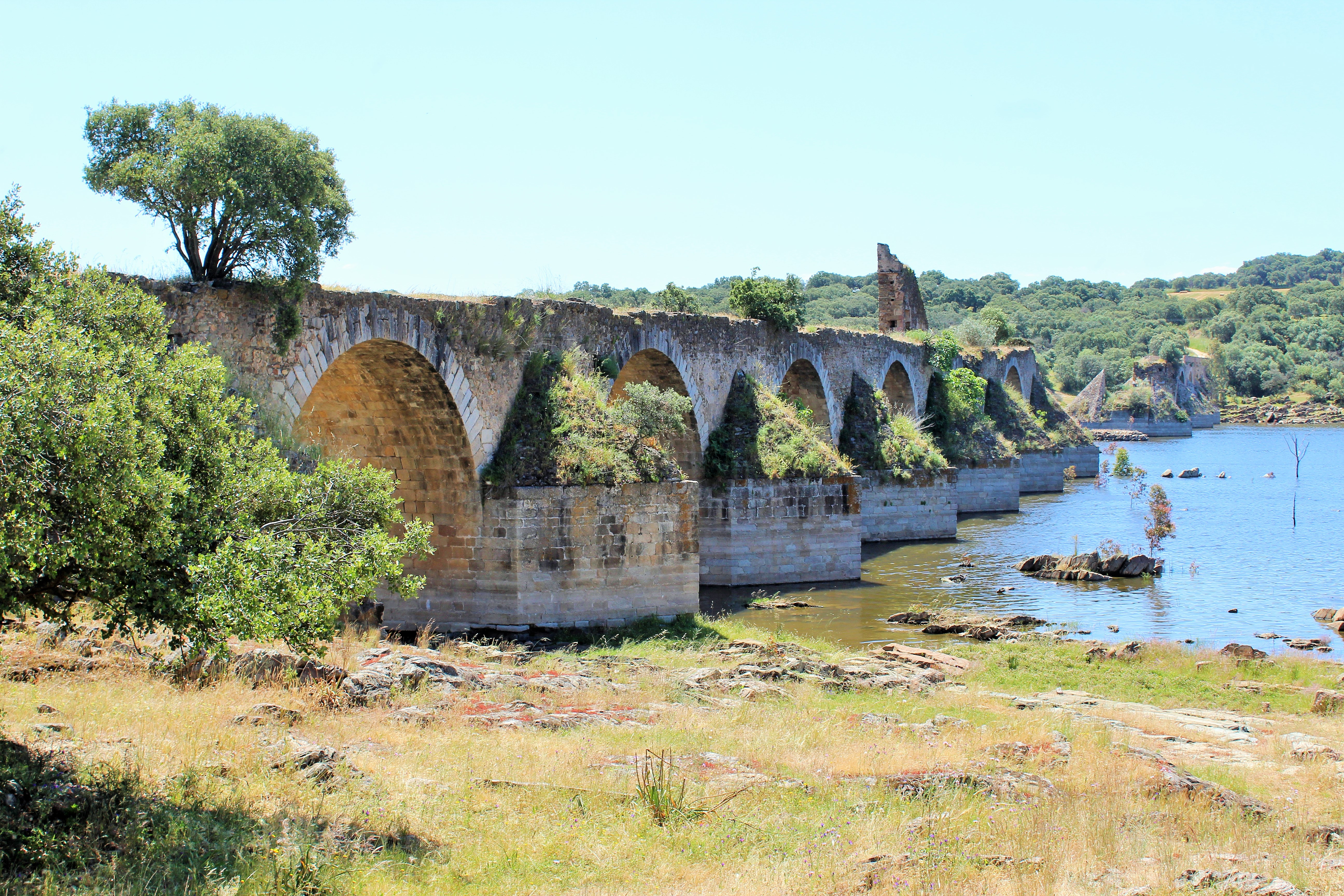 Río Guadiana Internacional al fondo. This is a photography of a Special Area of Conservation in Spain with the ID: ES4310027. Natura2000 entry, EEA entry